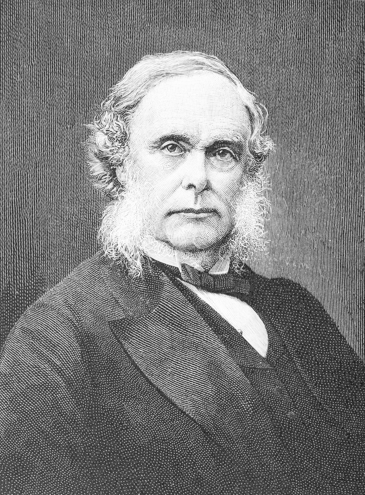 Joseph Lister